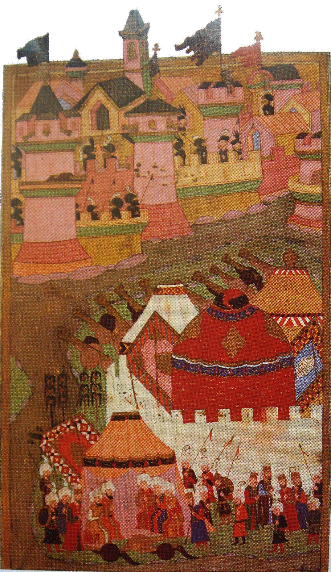 Siege Of Buda By Suleyman